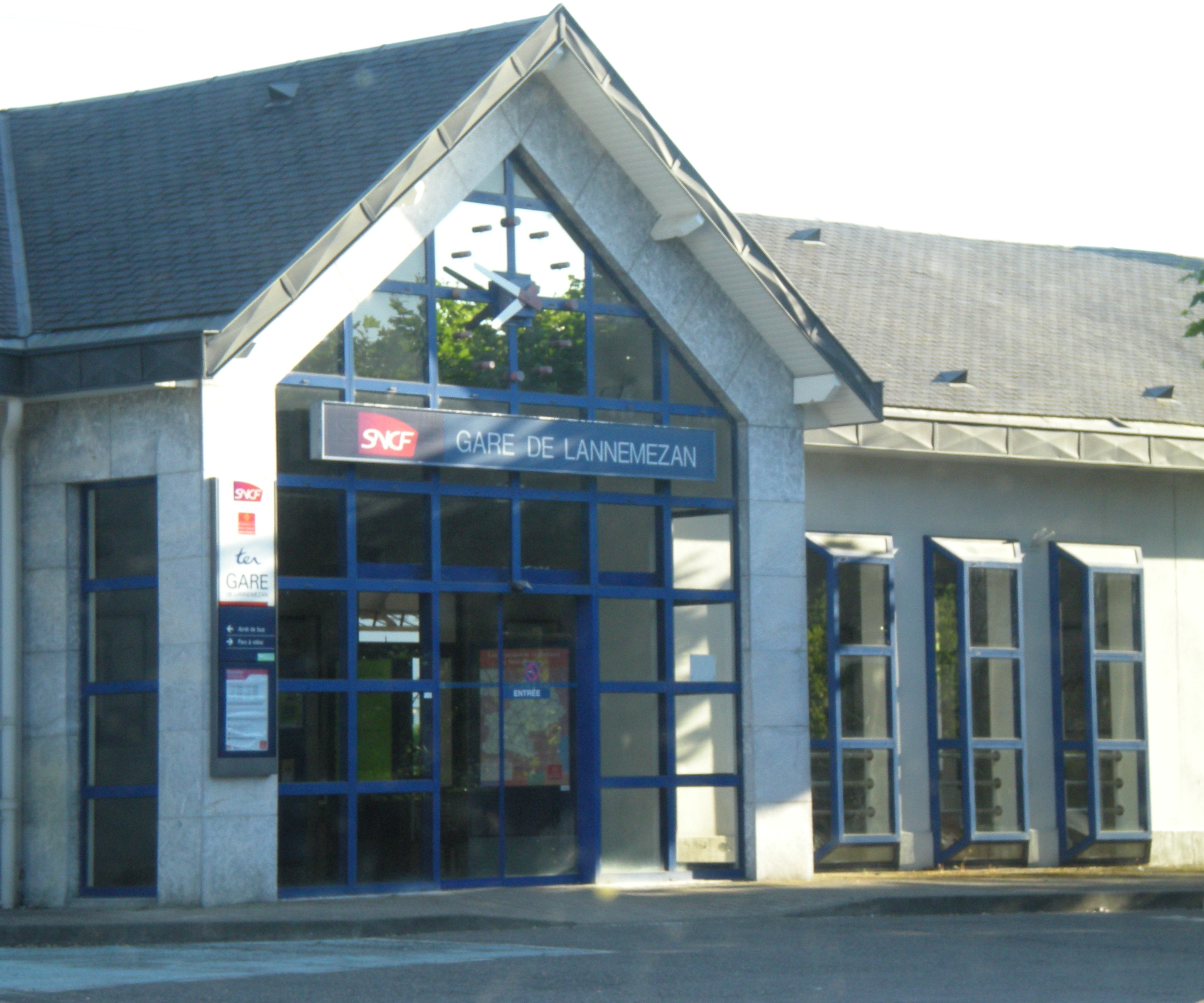 Vue de la façade de la Gare de Lannemezan